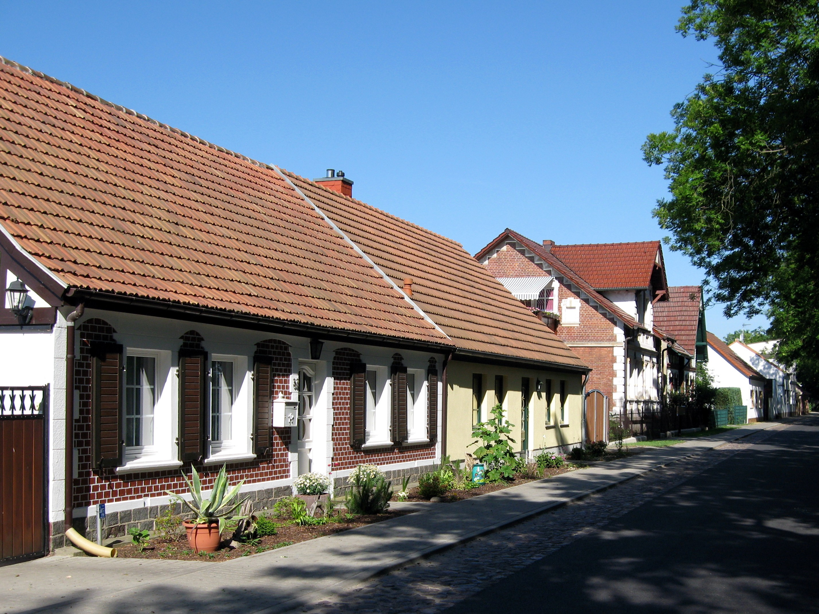 Ehemalige Schifferhäuser am Langen Trödel in Zerpenschleuse, Gemeinde Wandlitz, Landkreis Barnim, Land Brandenburg, Deutschland